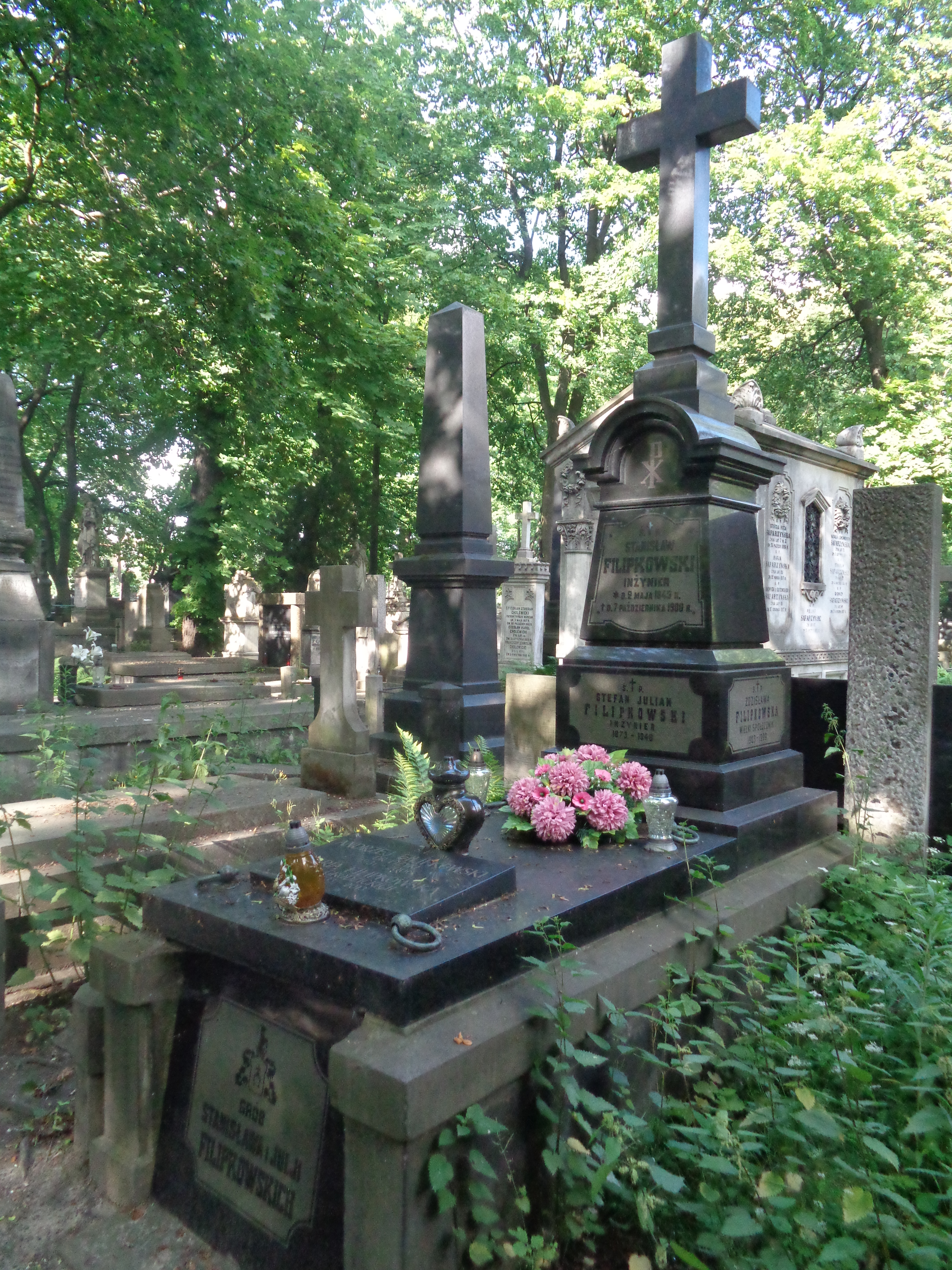 Grób Stefana Juliana Filipkowskiego na Cmentarzu Powązkowskim